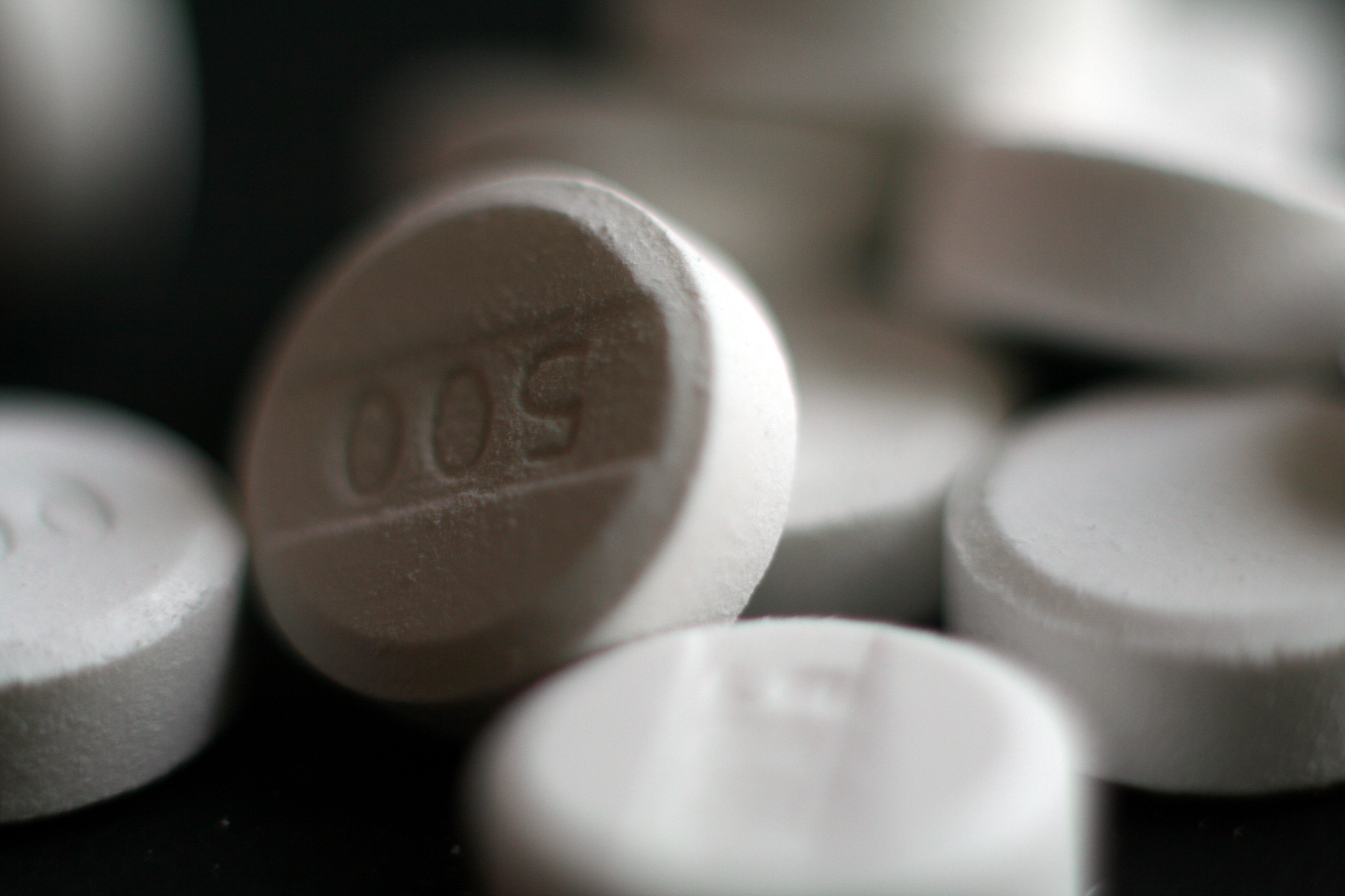 Paracetamol/acetaminophen pills, 500 mg.